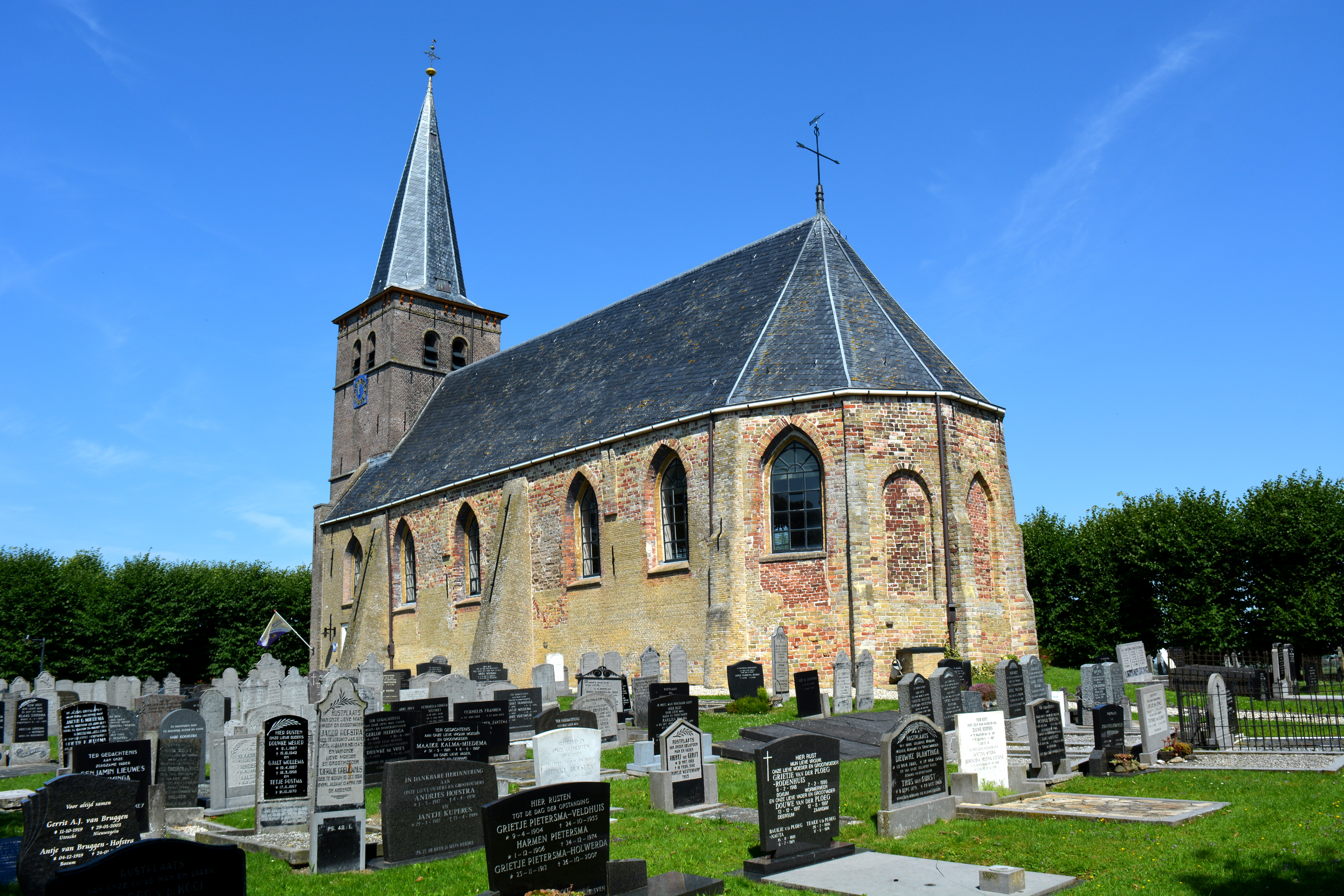 Boksum, Sint-Margrietkerk, exterieur